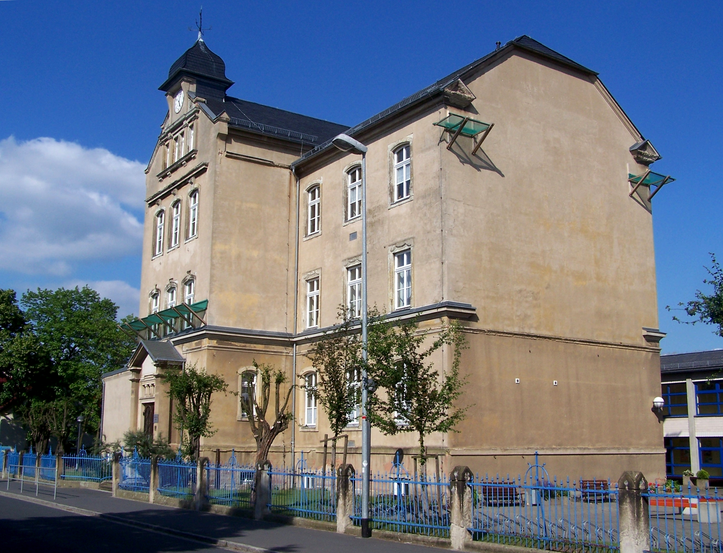 Mittelschule (Coswig-) Kötitz